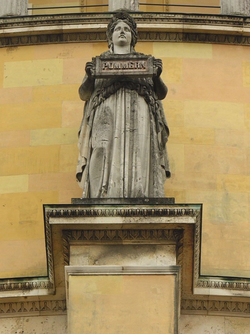 Diese Statue an der Aussenseite der Befreiungshalle in Kelheim steht für den Volksstamm aus Pommern, Höhe der Statue 580 cm. Sie ist eine von 18 Statuen, die nach Modellen des Bildhauers Johann Halbig geschaffen wurden.